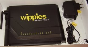 Wippies_modeemi_sivusta.JPG